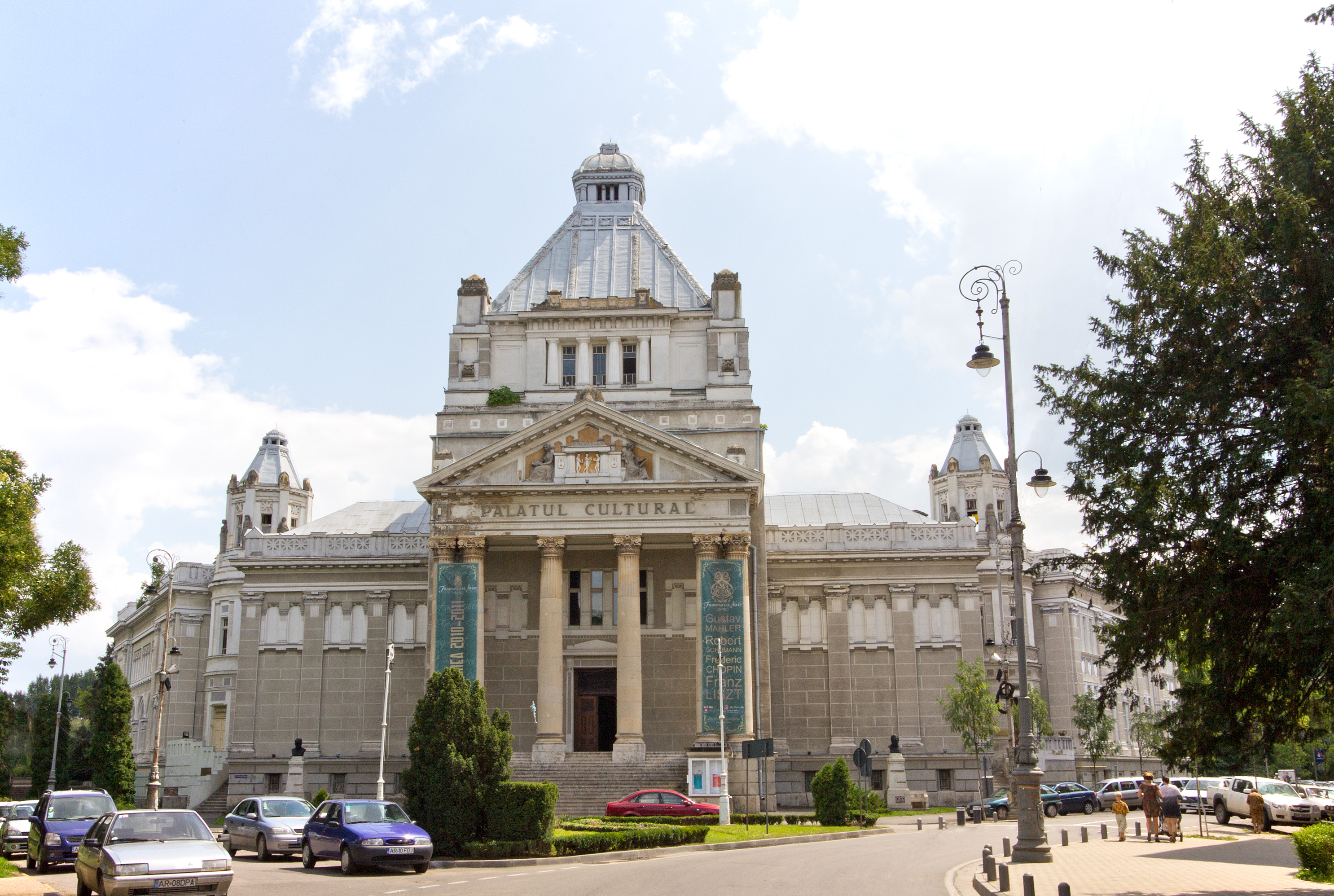 Kulturpalast (rumänisch Palatul Cultural), zwischen 1911 und 1913 fertiggestelltes Gebäude in Arad (Rumänien. Errichtet auf Initiative der Kölcsey Kulturgesellschaft nach den Plänen des Arader Architekten Lajos Szantay. Beherbergt Teile des Museums und die Philharmonie.